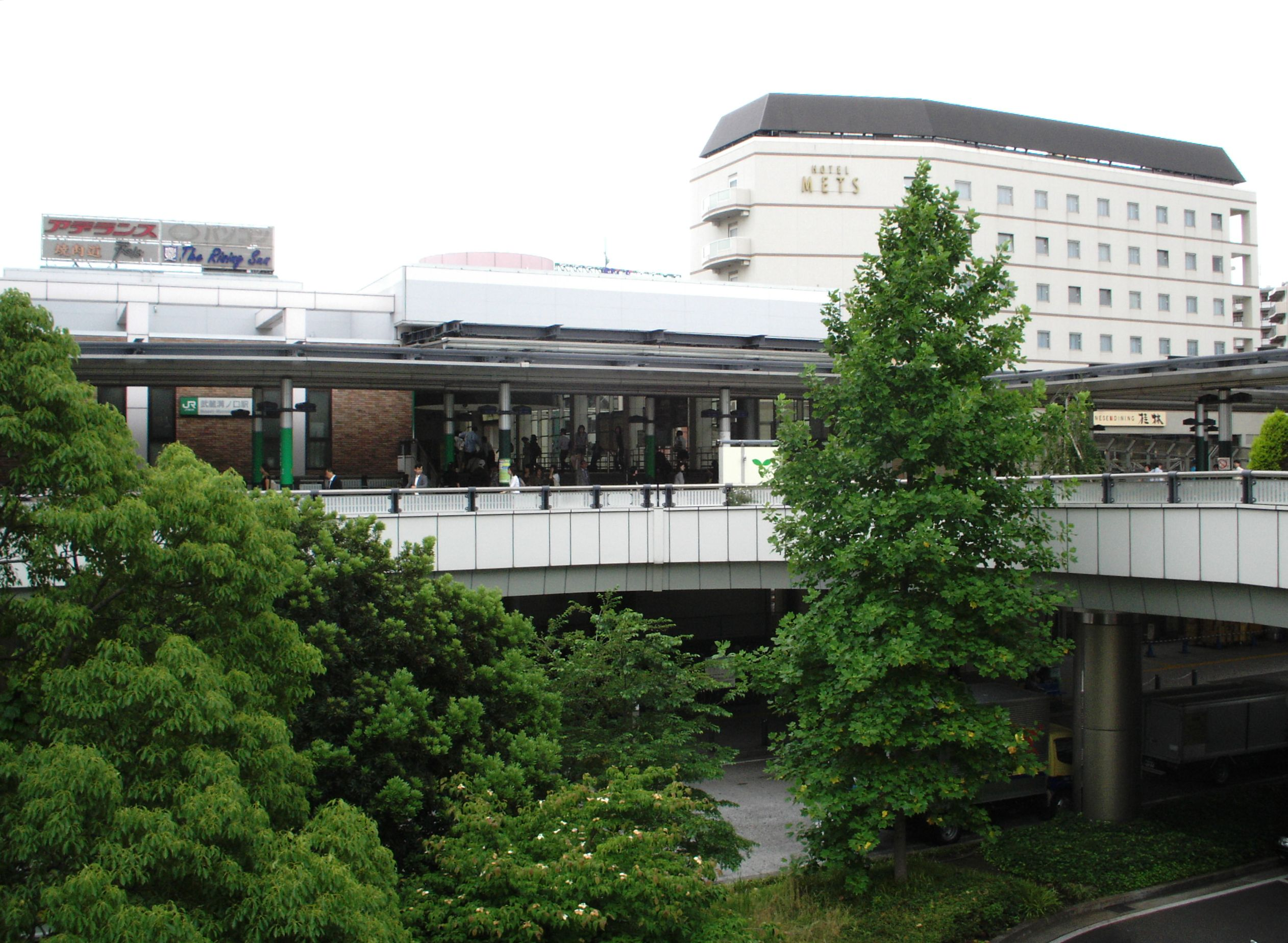 武蔵溝ノ口駅